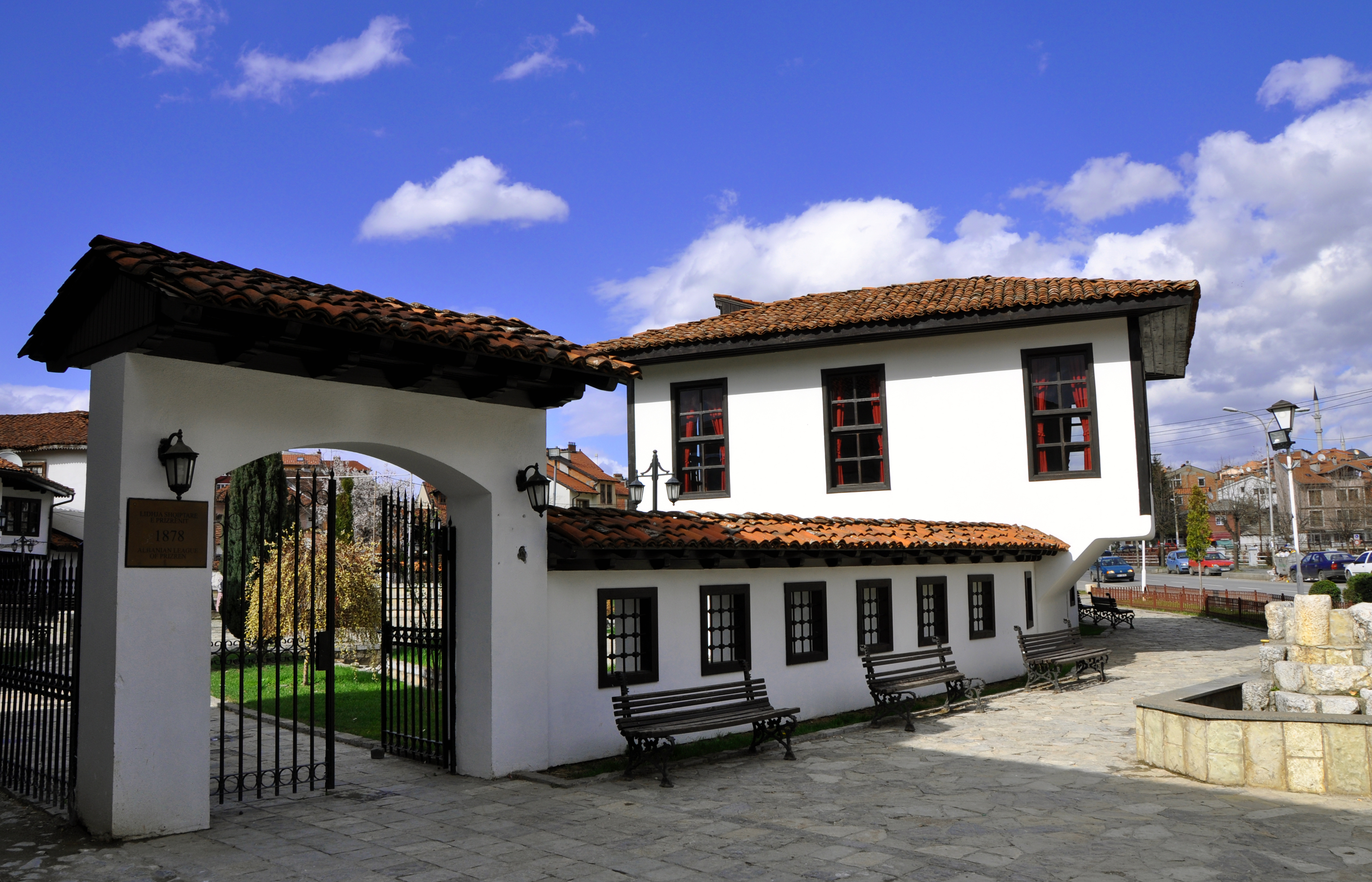 Ndërtesa e Lidhjes së Prizrenit